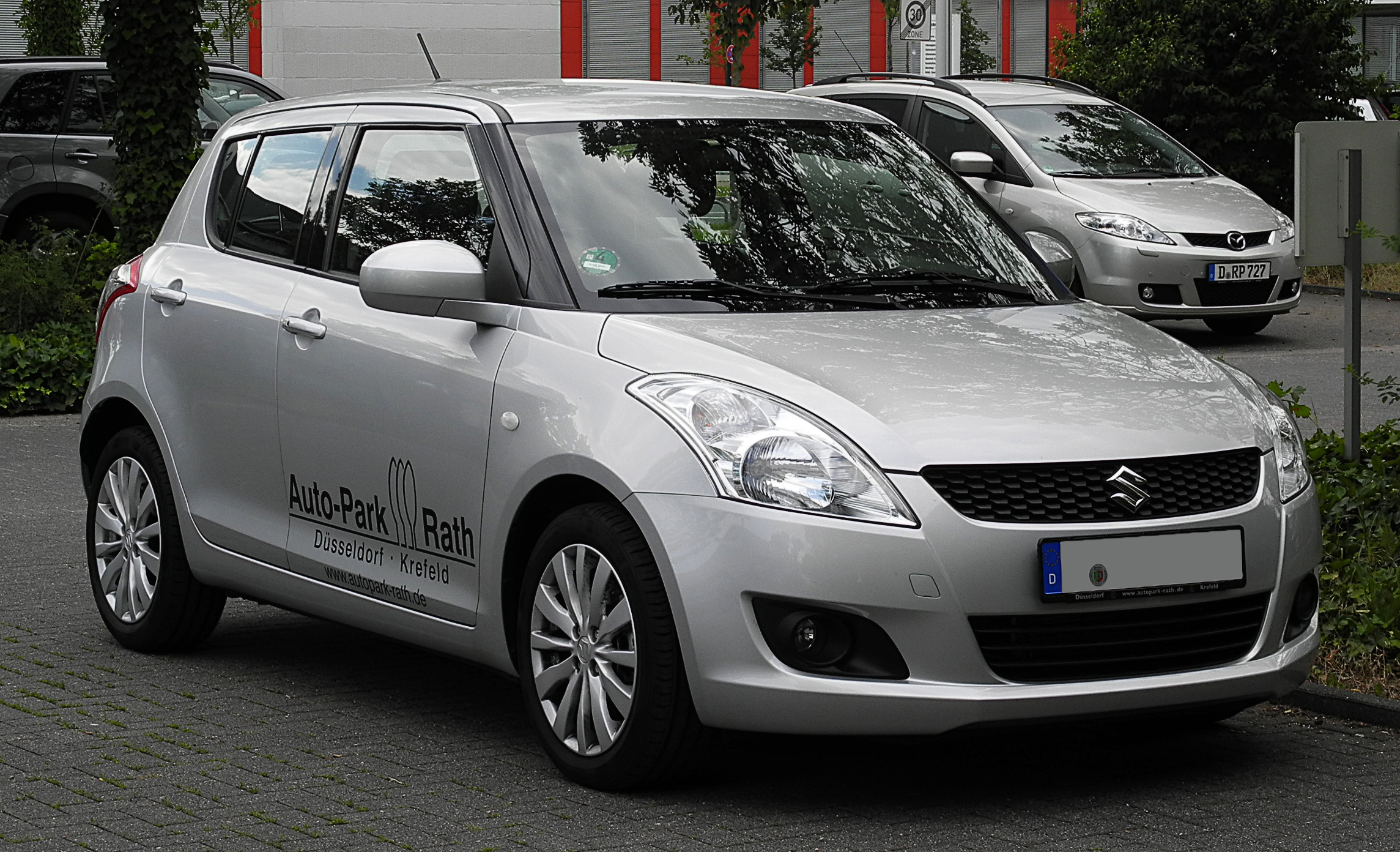 Suzuki Swift 1.2 Comfort (FZ NZ)